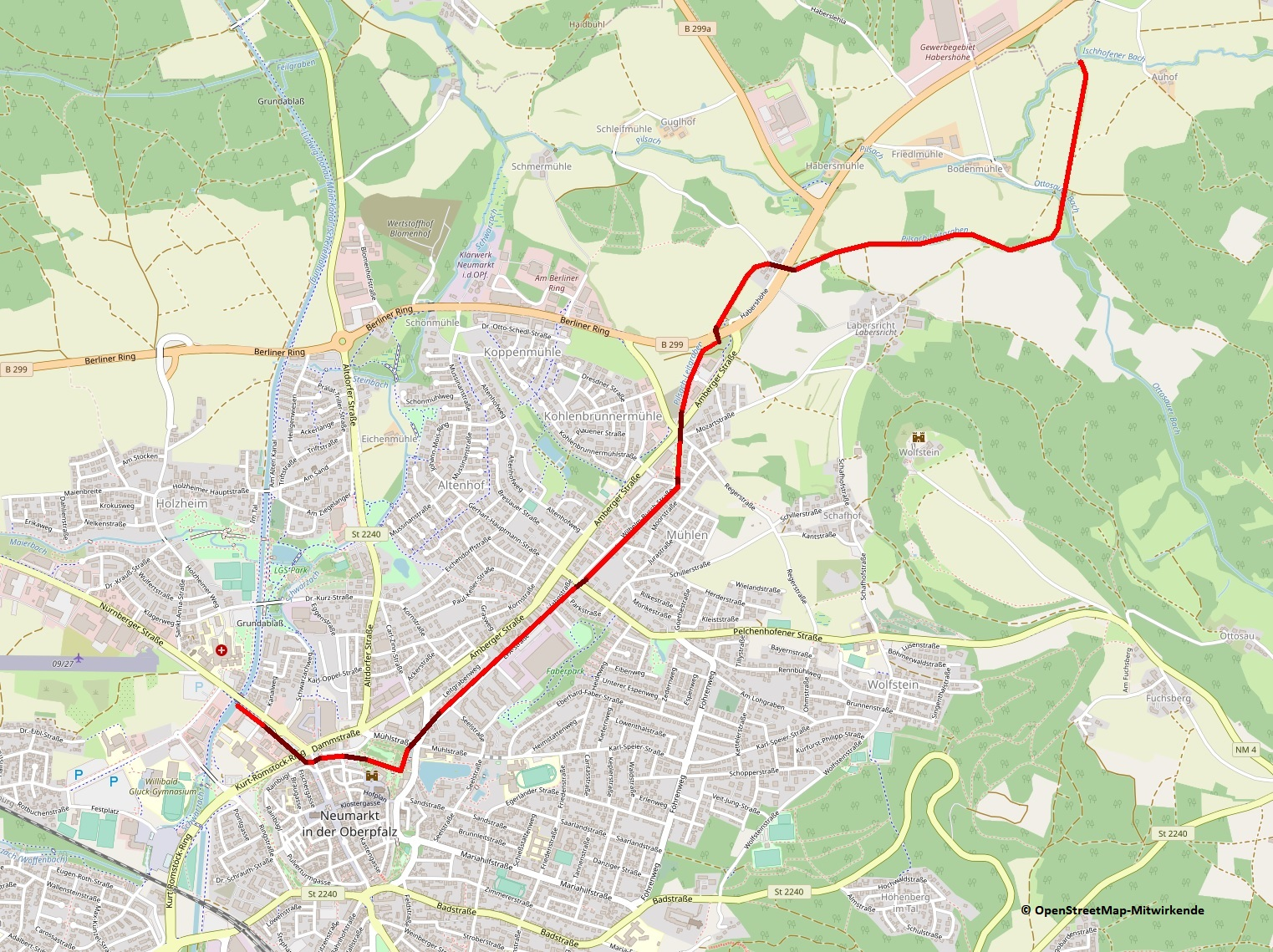 Verlauf des Pilsach Leitgrabens als Zuleitung des Ludwig-Donau-Main Kanals bei Neumarkt i.d.OPf. Dunkelrot dargestellt sind die verrohrten Abschnitte. This map may be incomplete, and may contain errors. Don't rely solely on it for navigation.